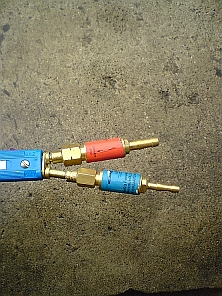 Bezpieczniki suche przypalnikowe